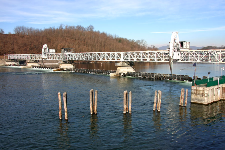 Lo sbarramento della "Miorina" lungo il fiume Ticino, tra i comuni di Castelletto Sopra Ticino (NO) e Golasecca (VA)